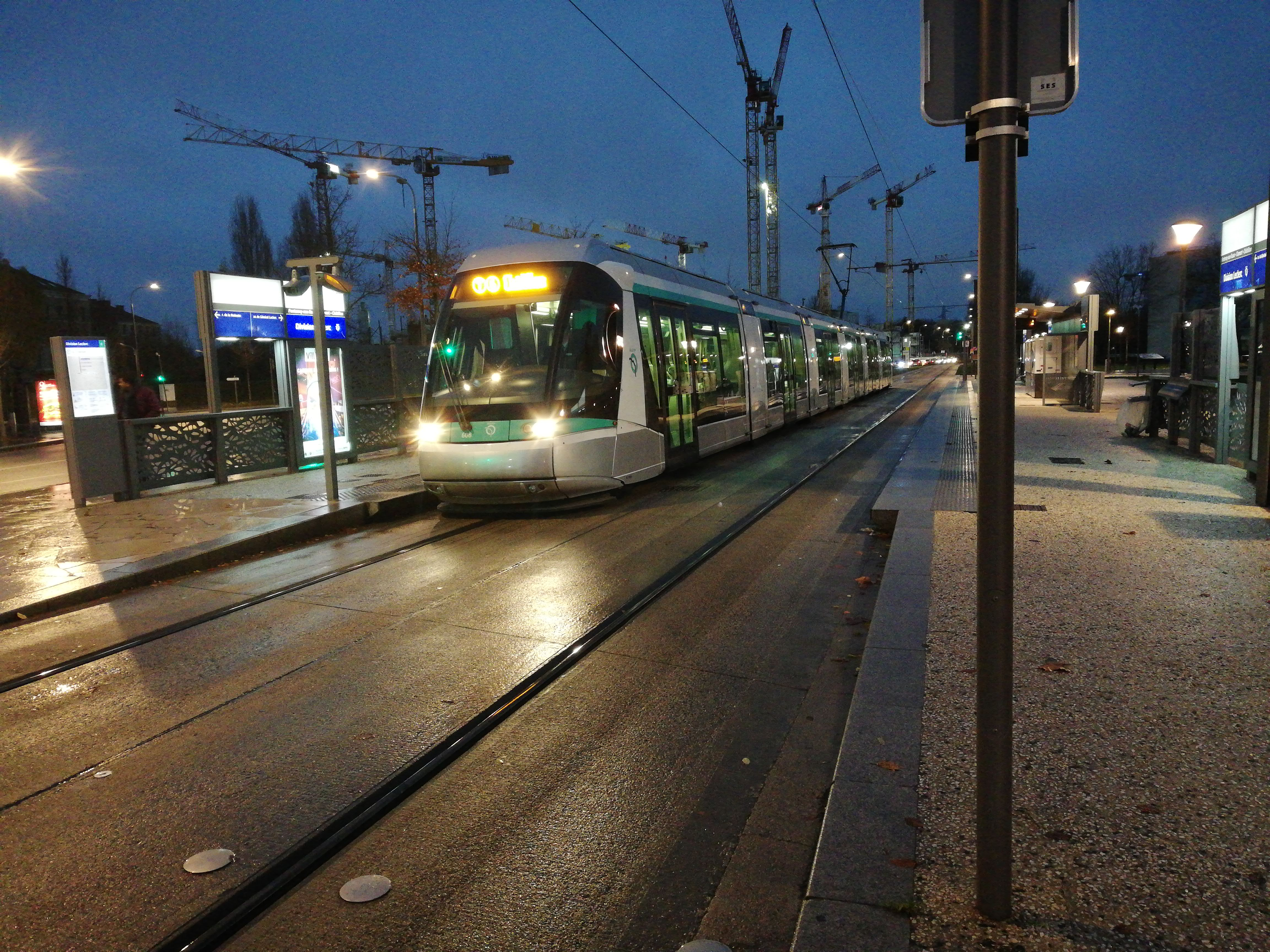 Un Translohr STE6 stationne à la station Division Leclerc en attendant de repartir vers Châtillon-Montrouge, en 2018.